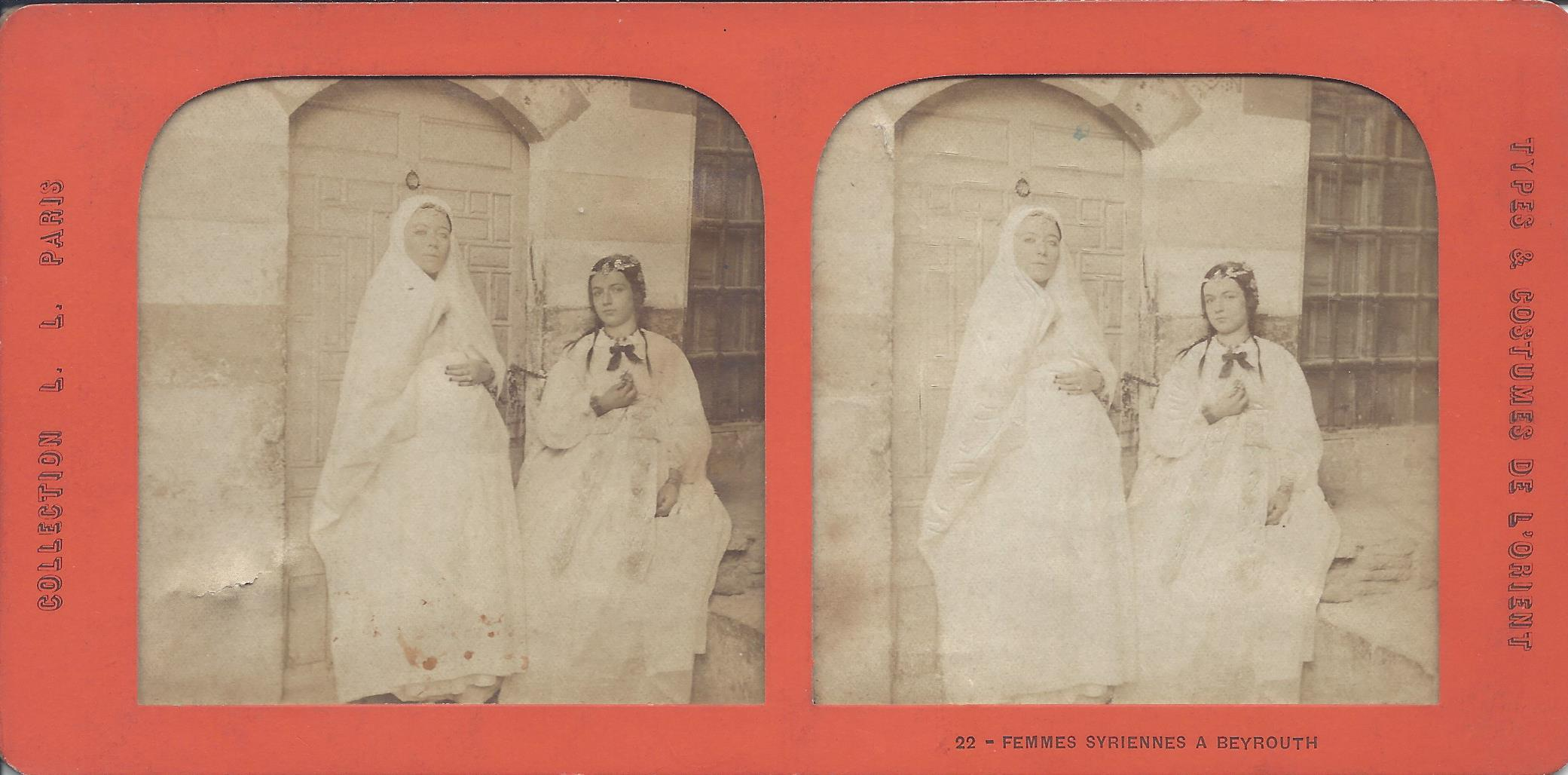 Ludovico Wolfgang Hart: Zwei Frauen aus Beirut. Stereokarte der Collection Levy & Leon um 1870, transparent mit Kolorierung und Schlitzung.